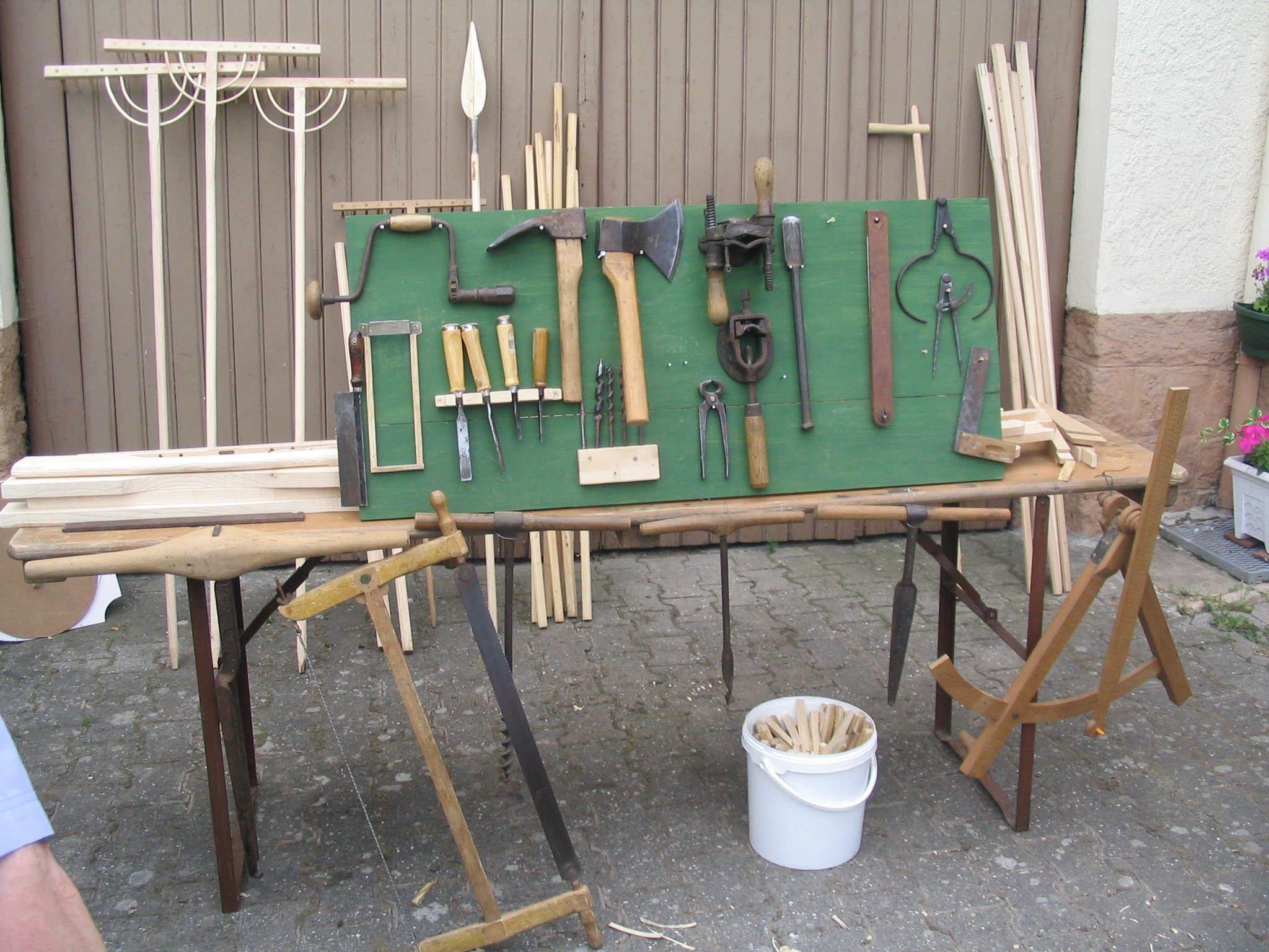 Werkzeuge eines Wagners, Aufgenommen beim Biosphärenfest in Niedergailbach 2006